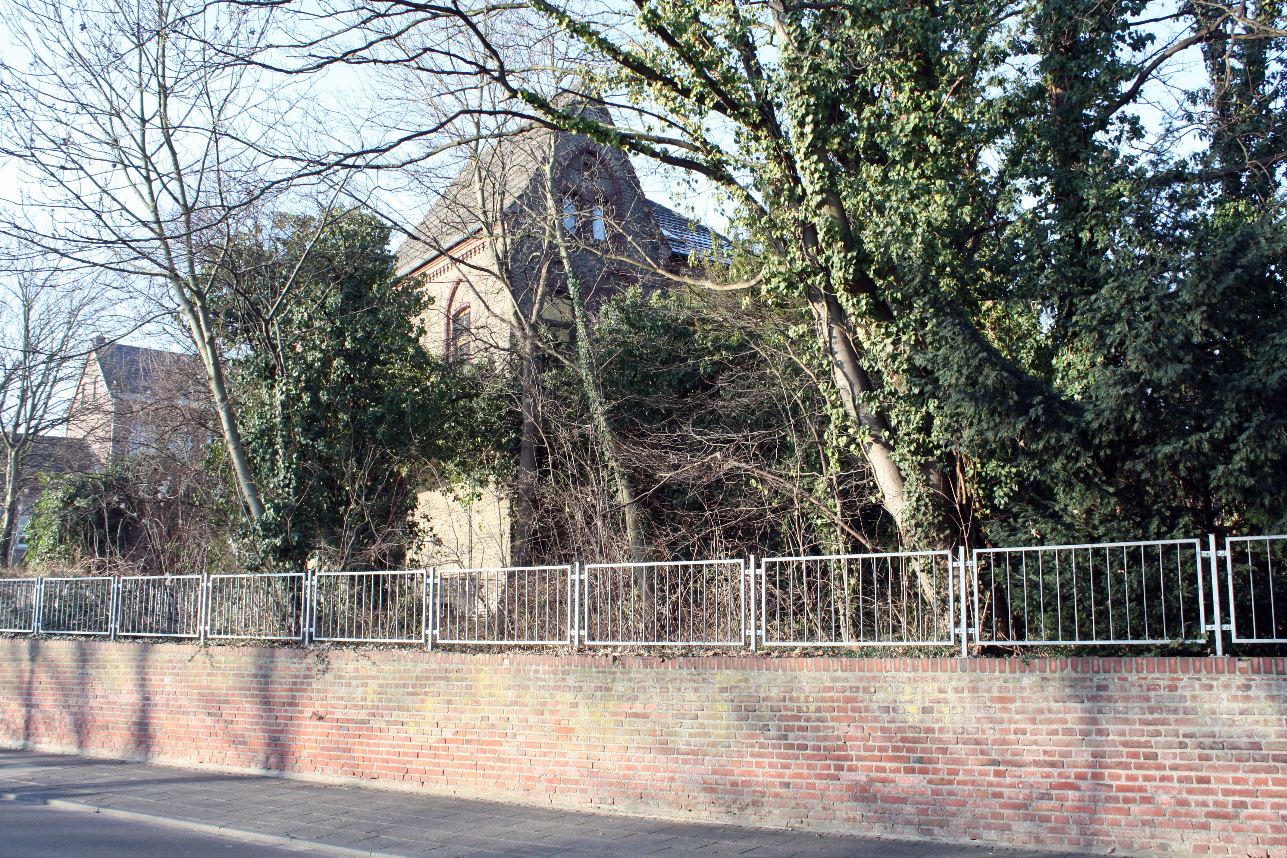 St. Johann Baptist Kendenich, altes Pfarrhaus und Garten